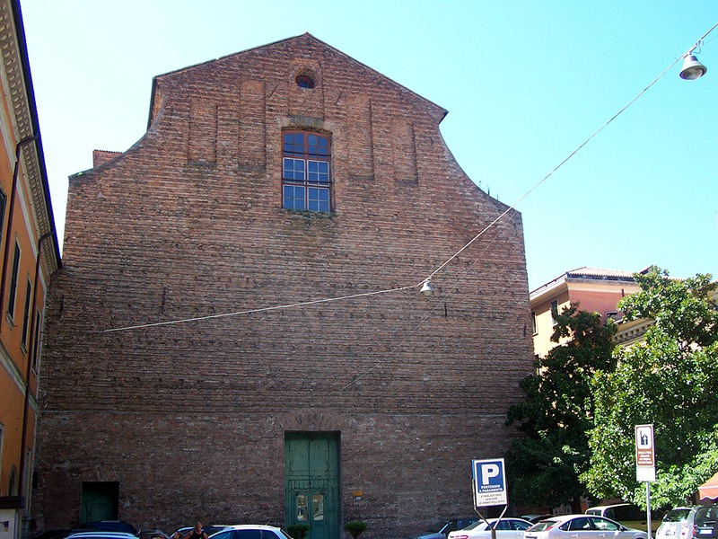 Ferrara - Chiesa di S. Maria dei Teatini